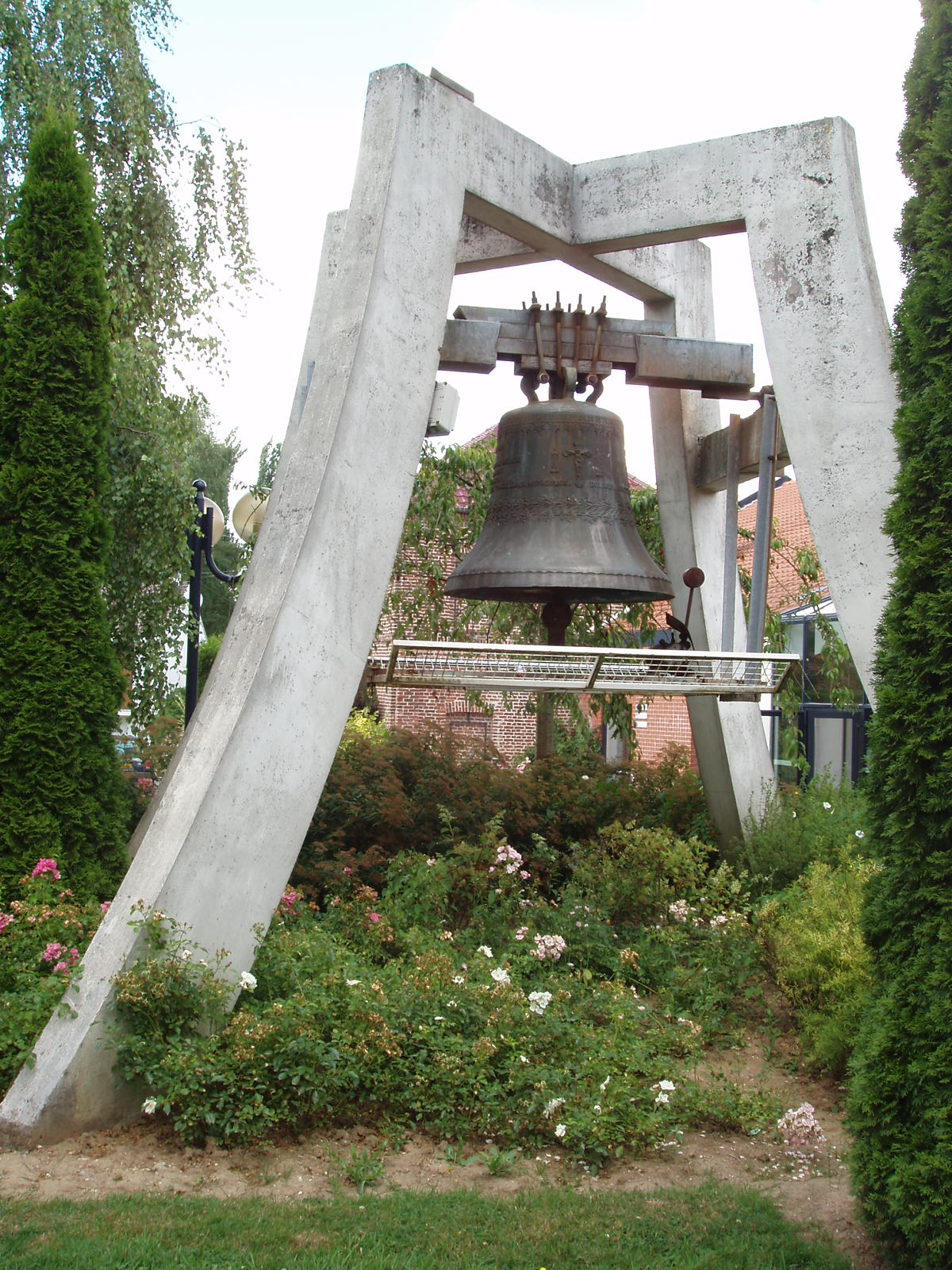 Photographie de Cloche de l'église du village d'Izel-les-Hameaux dans le département du Pas-de-Calais (France), prise par Gloran le 31 juillet 2006.